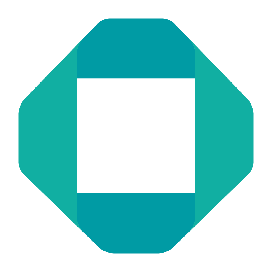 Logo Elastimpex Romania